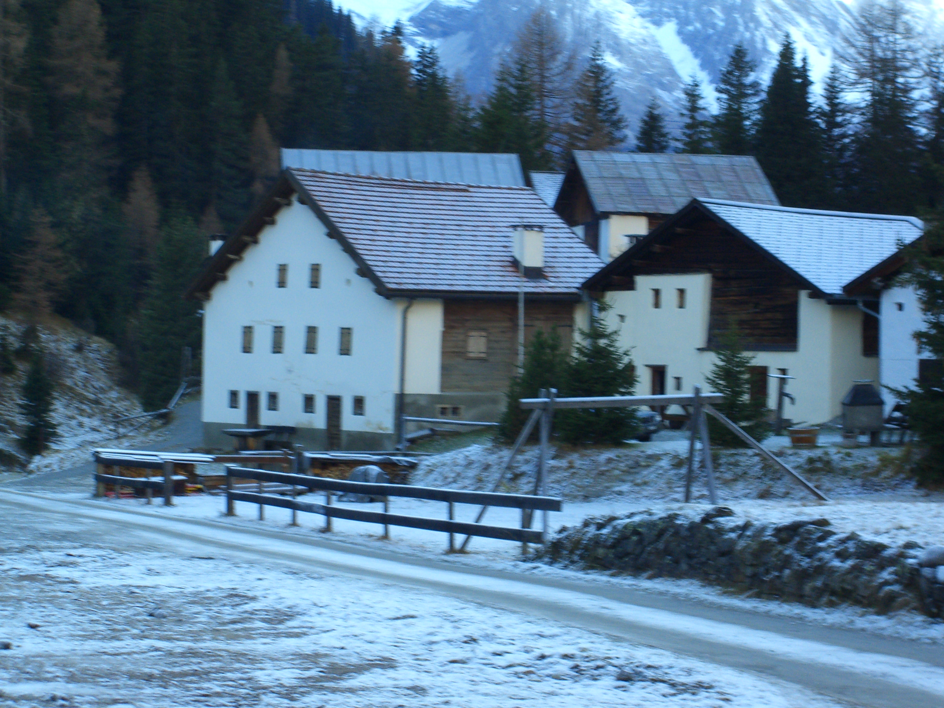 Tuors Davant im Val Tuors (Graubünden, Schweiz). Quelle: Bravuogn, Autor: Bravuogn